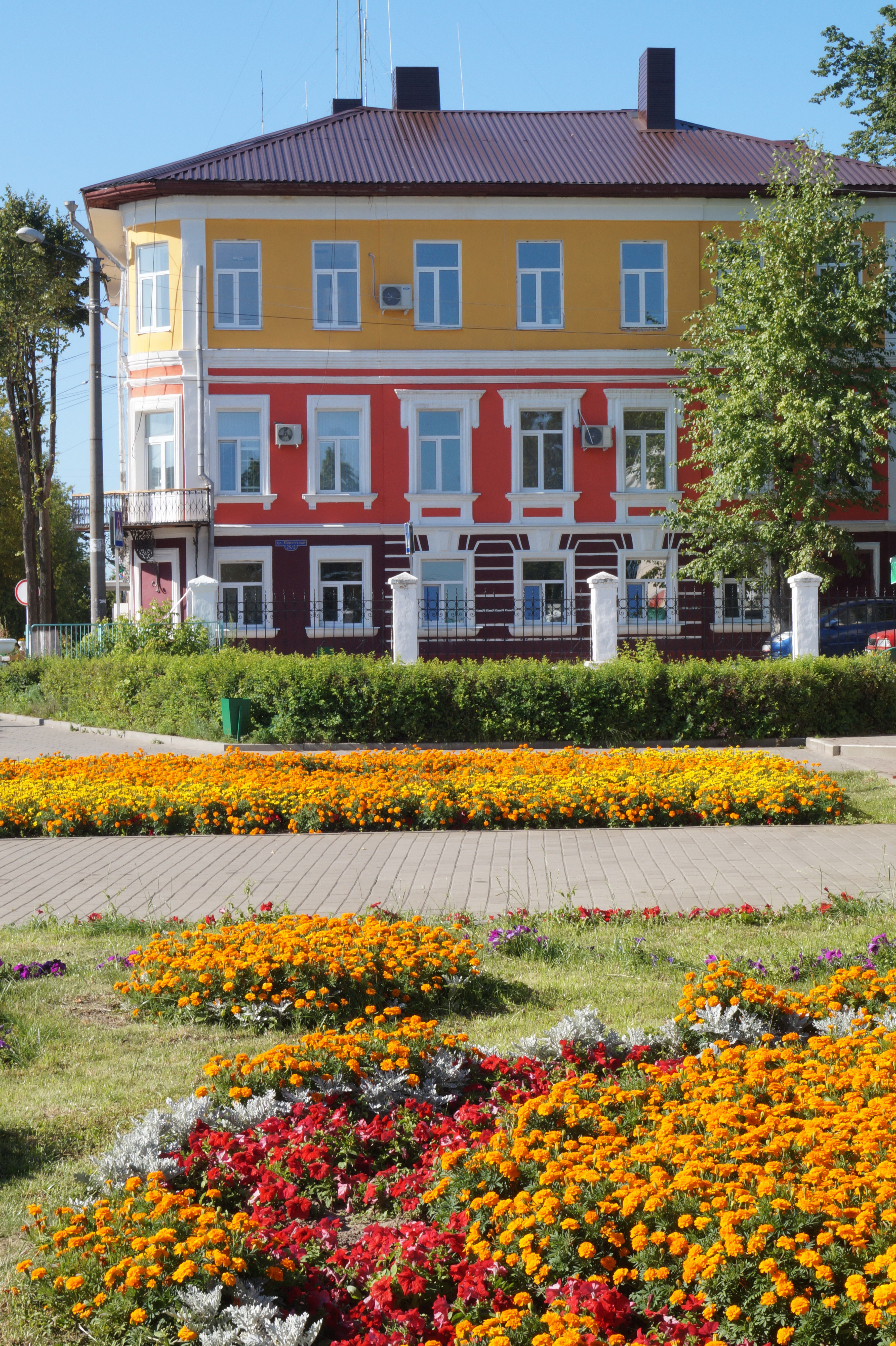 Жандармерия